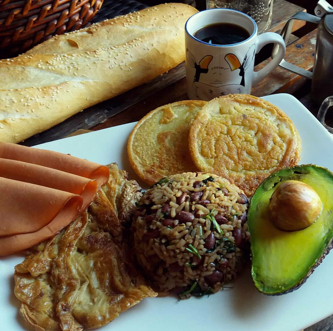 Desayuno costarricense. Tomada en la escuela "Costa Rica network food"